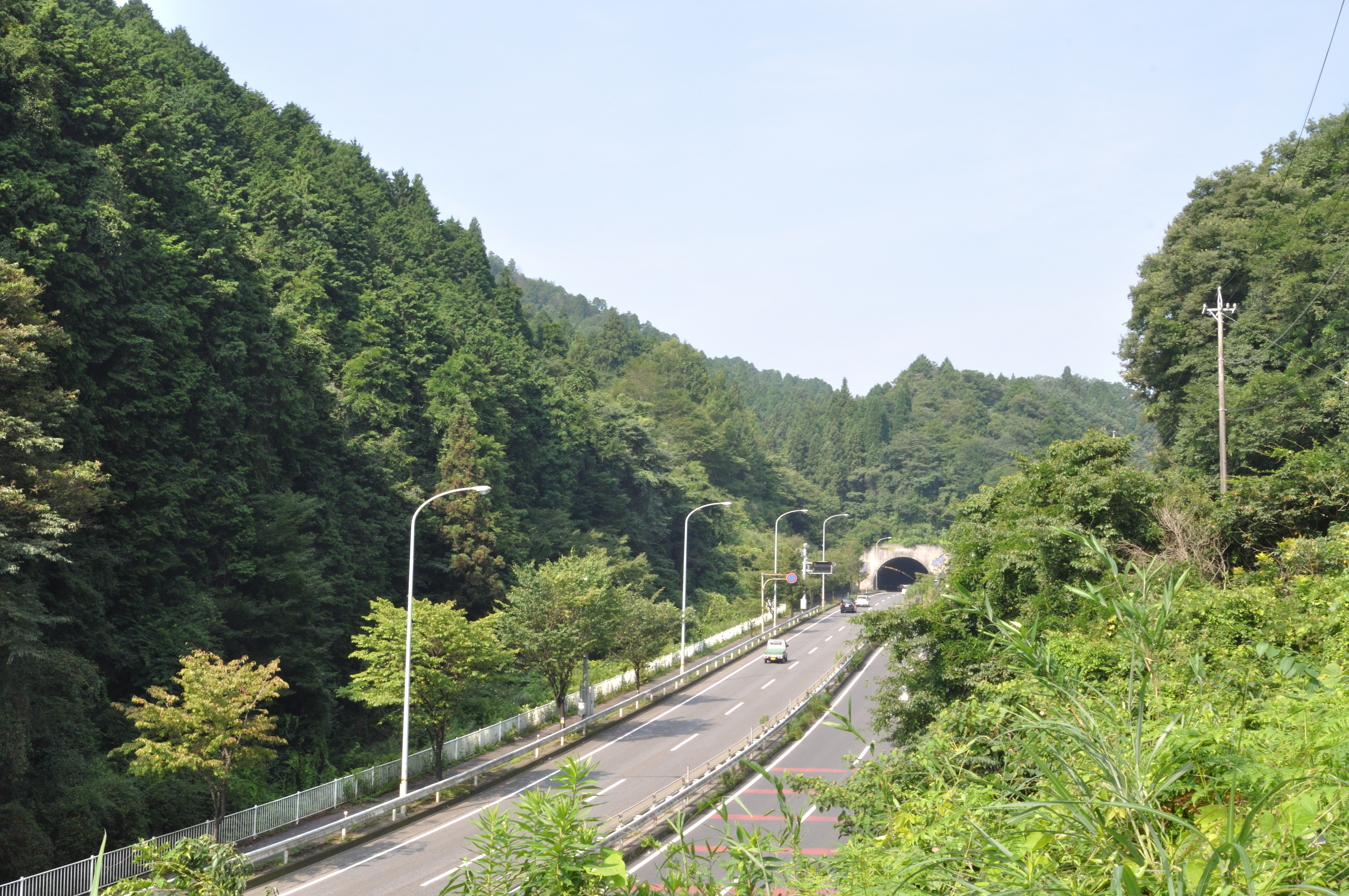 内津峠の周辺画像（国道19号内津トンネル）